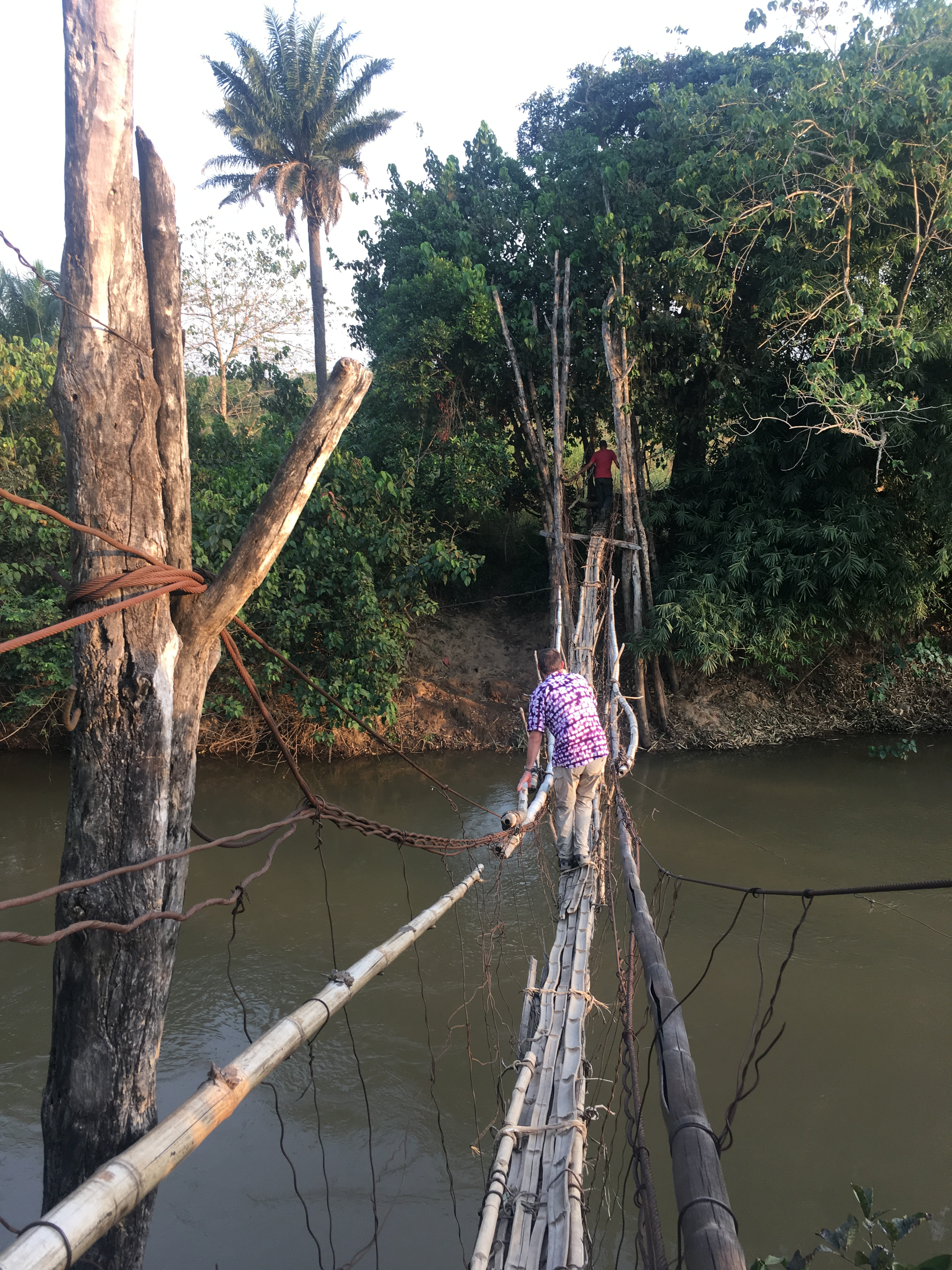 Hängebrücke über einen Fluss am Stadtrand von Kissidougou